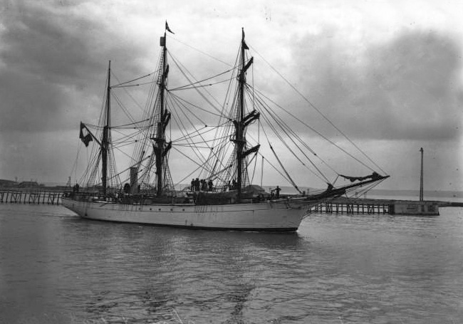 le Pourquoi Pas au Havre, mission Charcot, 15 août 1908 (photographie de presse)